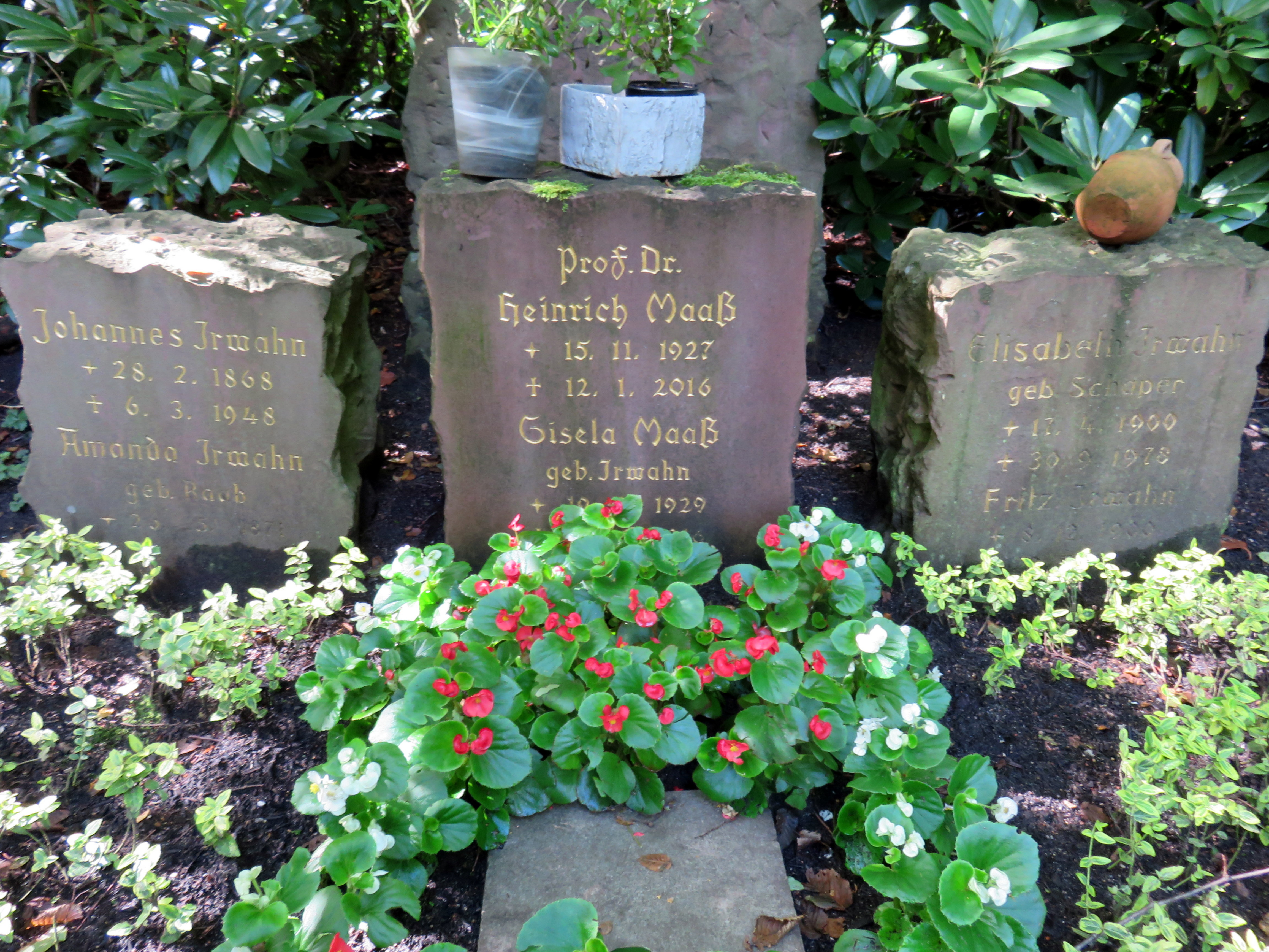 Grab des deutschen Gynäkologen Heinrich Maaß, Friedhof Ohlsdorf, Planquadrat C13,162-73 (südöstlich Kapelle 4).